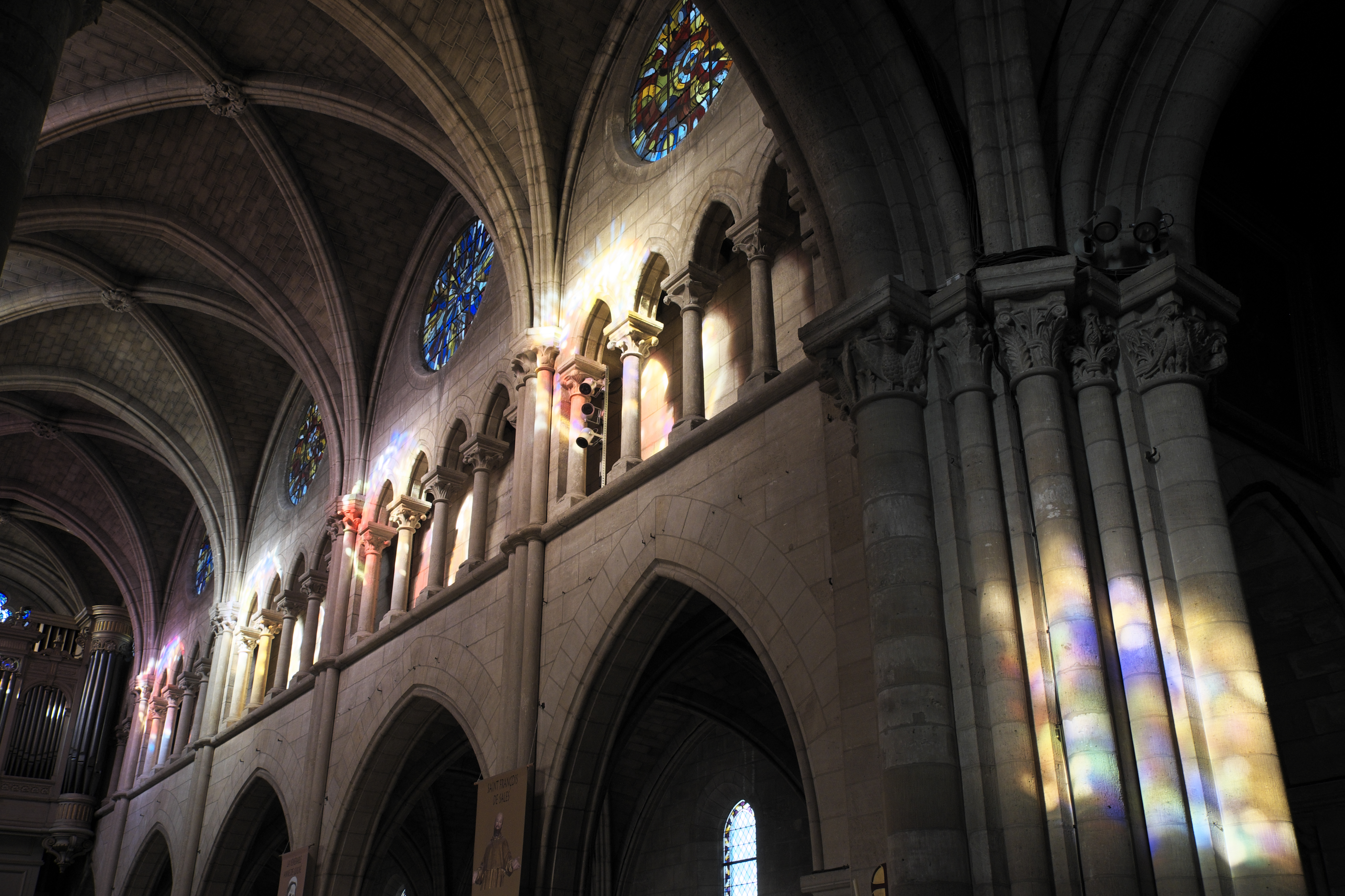 Katholische Pfarrkirche Notre-Dame in Bougival im Département Yvelines (Île-de-France/Frankreich), Triforium